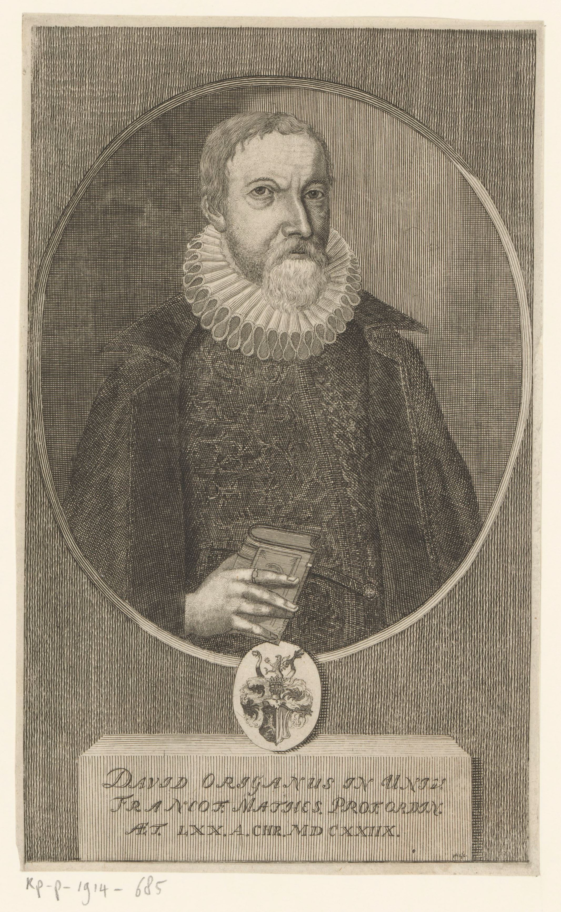 IdentificatieTitel(s): Portret van David OriganusObjecttype: prent Objectnummer: RP-P-1914-685Catalogusreferentie: HAB A 15488Opschriften / Merken: verzamelaarsmerk, verso, gestempeld: Lugt 2228VervaardigingVervaardiger: prentmaker: Heinrich Jakob Otto (vermeld op object)Datering: 1650 - 1749Fysieke kenmerken: gravureMateriaal: papier Techniek: graveren (drukprocedé)Afmetingen: plaatrand: h 277 mm × b 169 mmOnderwerpWat: historical personsarmorial bearing, heraldryWie: David OriganusVerwerving en rechtenVerwerving: aankoop 1905Copyright: Publiek domein